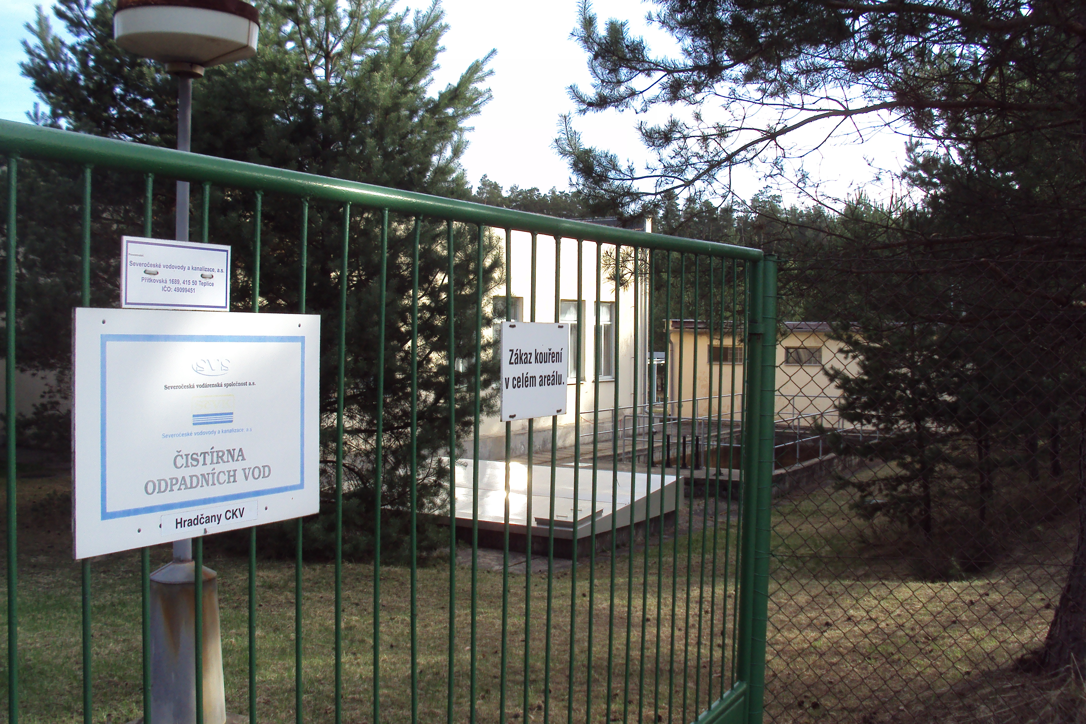 Čistička je v areálu hradčanského letiště